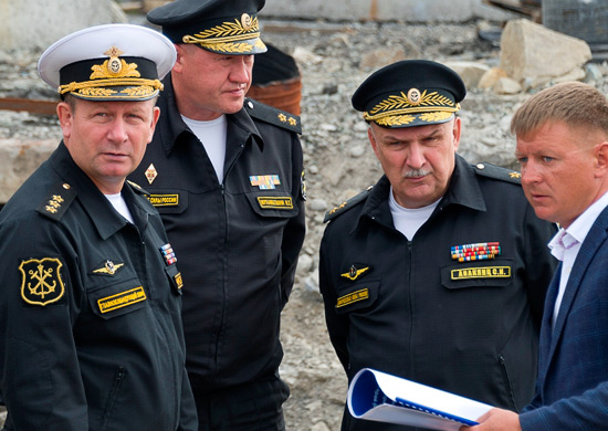 Главнокомандующий Военно-морским флотом Российской Федерации адмирал Виктор Чирков, командующий ТОФ вице-адмирал Сергей Авакянц и командующий подводными силами ТОФ вице-адмирал Игорь Мухаметшин в ЗАТО Вилючинск (Камчатка)